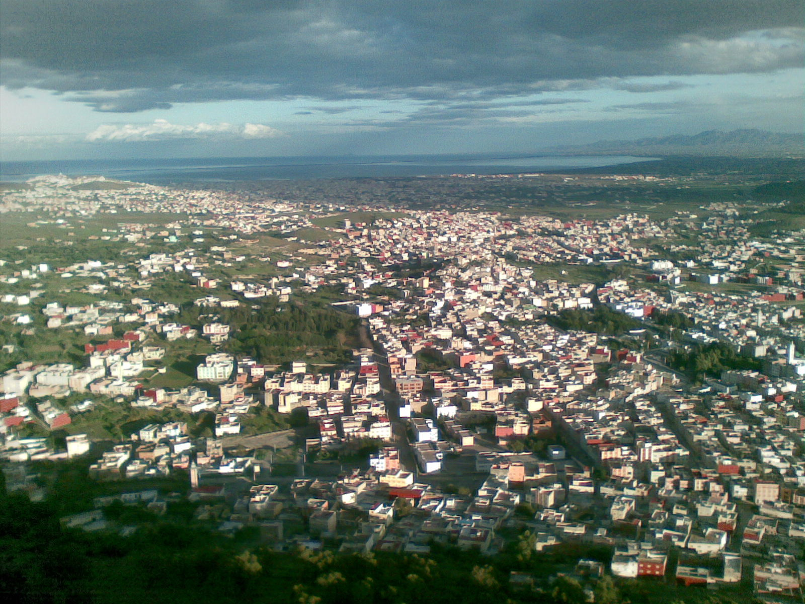 Nador From Gourougou Mountain